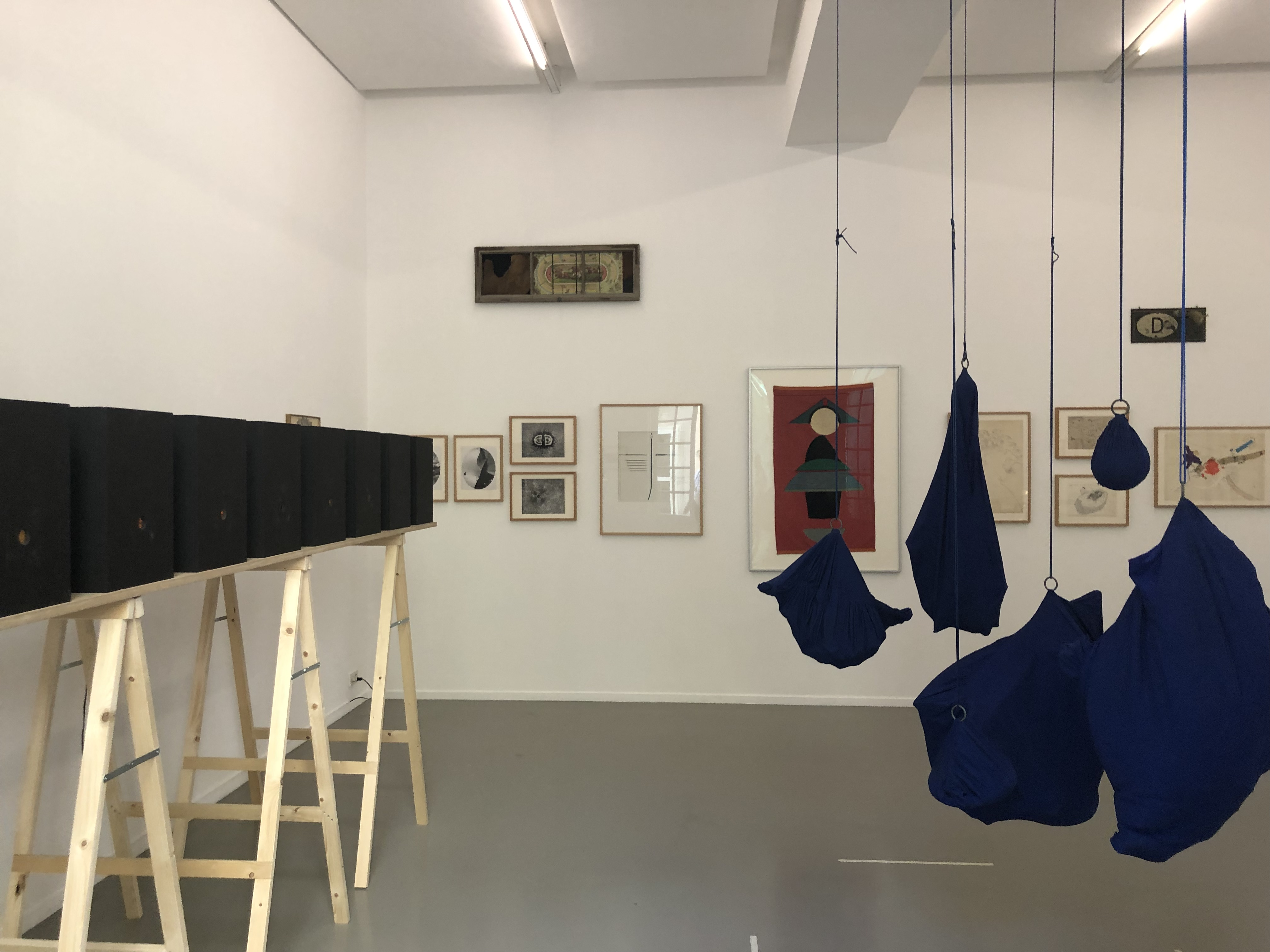 evènement sur les sorcières et Doris Stauffer au Centre Culturel Suisse avec les sans pages